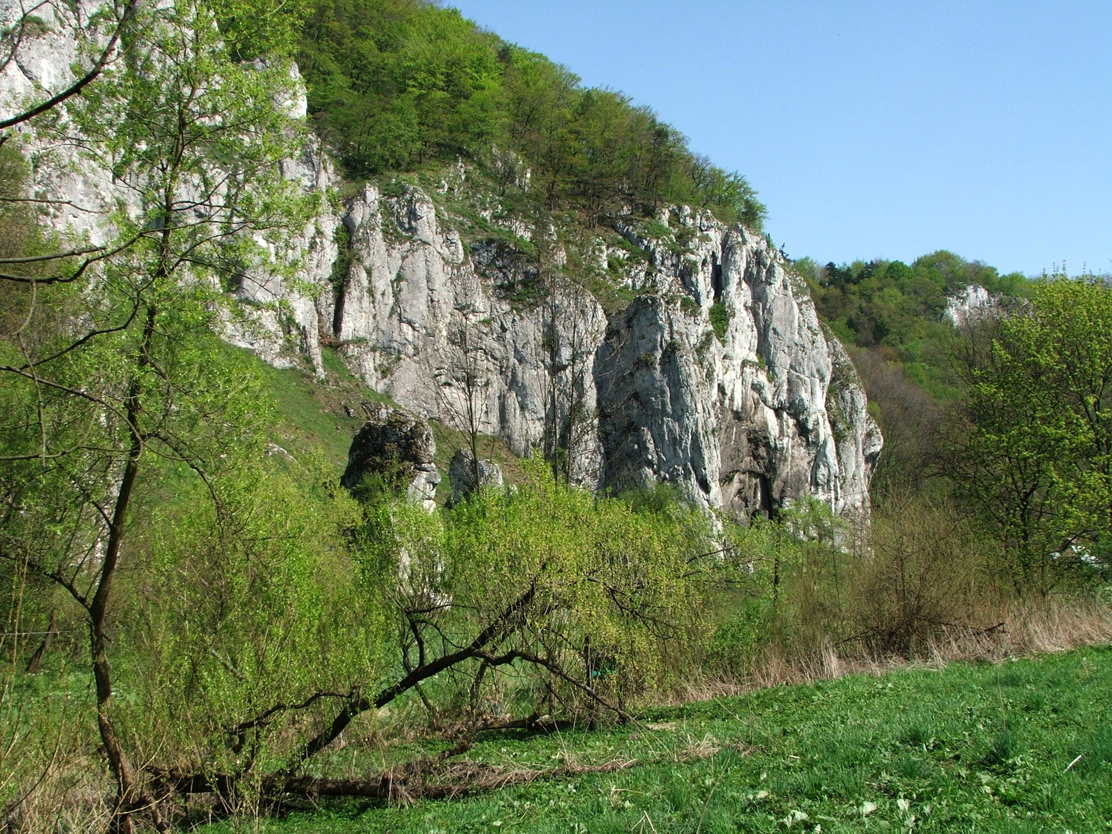 Dolina Prądnika (Ojcowski Park Narodowy)